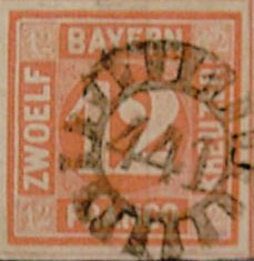 Geschlossene Mühlradstempel 441 (Pottenstein Of oder Rothenburg Mf) auf 12 kreuzer, 1858 Ausgabe bayerischer Briefmarke